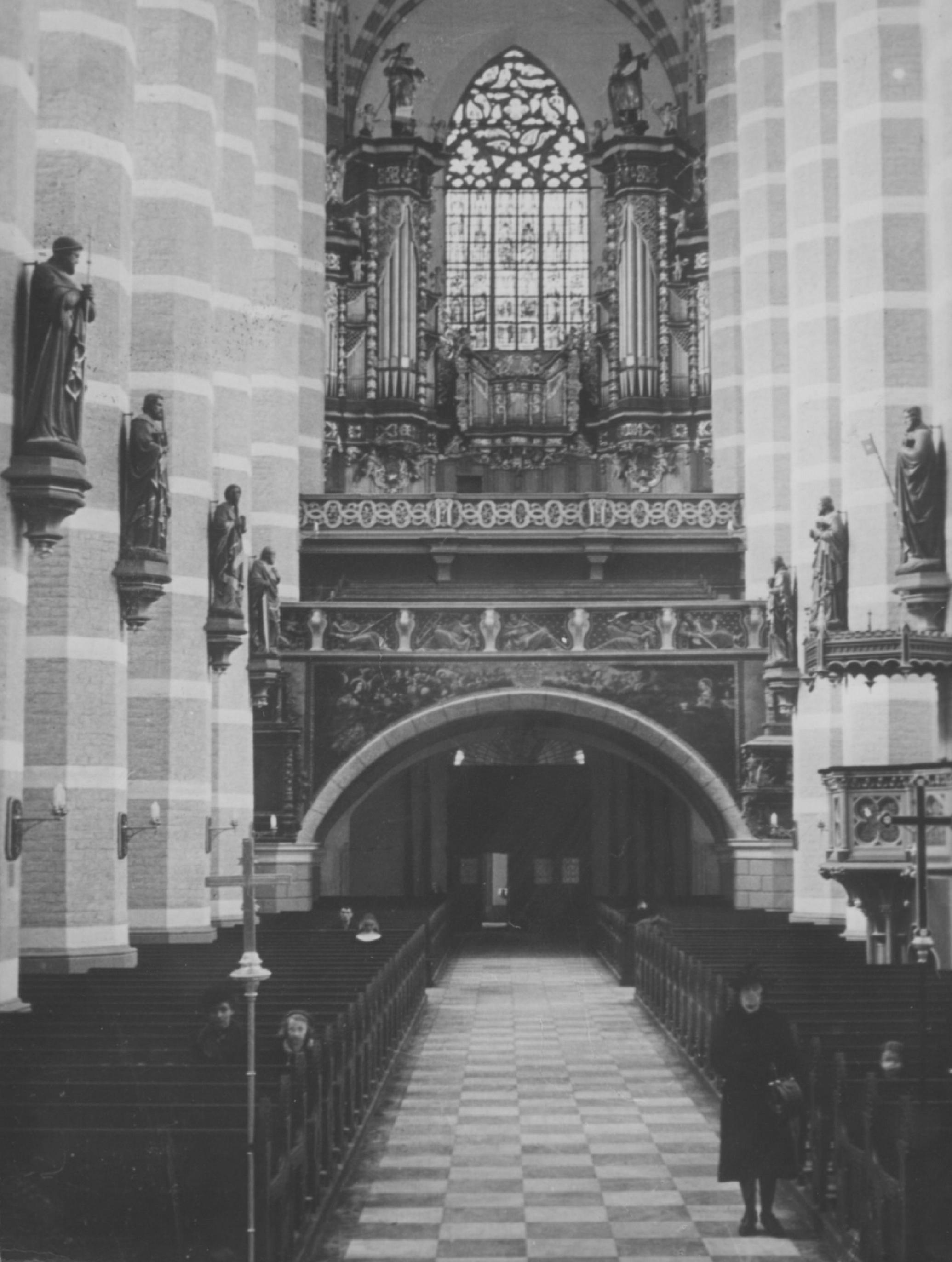 Wnętrze kościoła św. Jakuba i św. Agnieszki w Nysie po regotyzacji